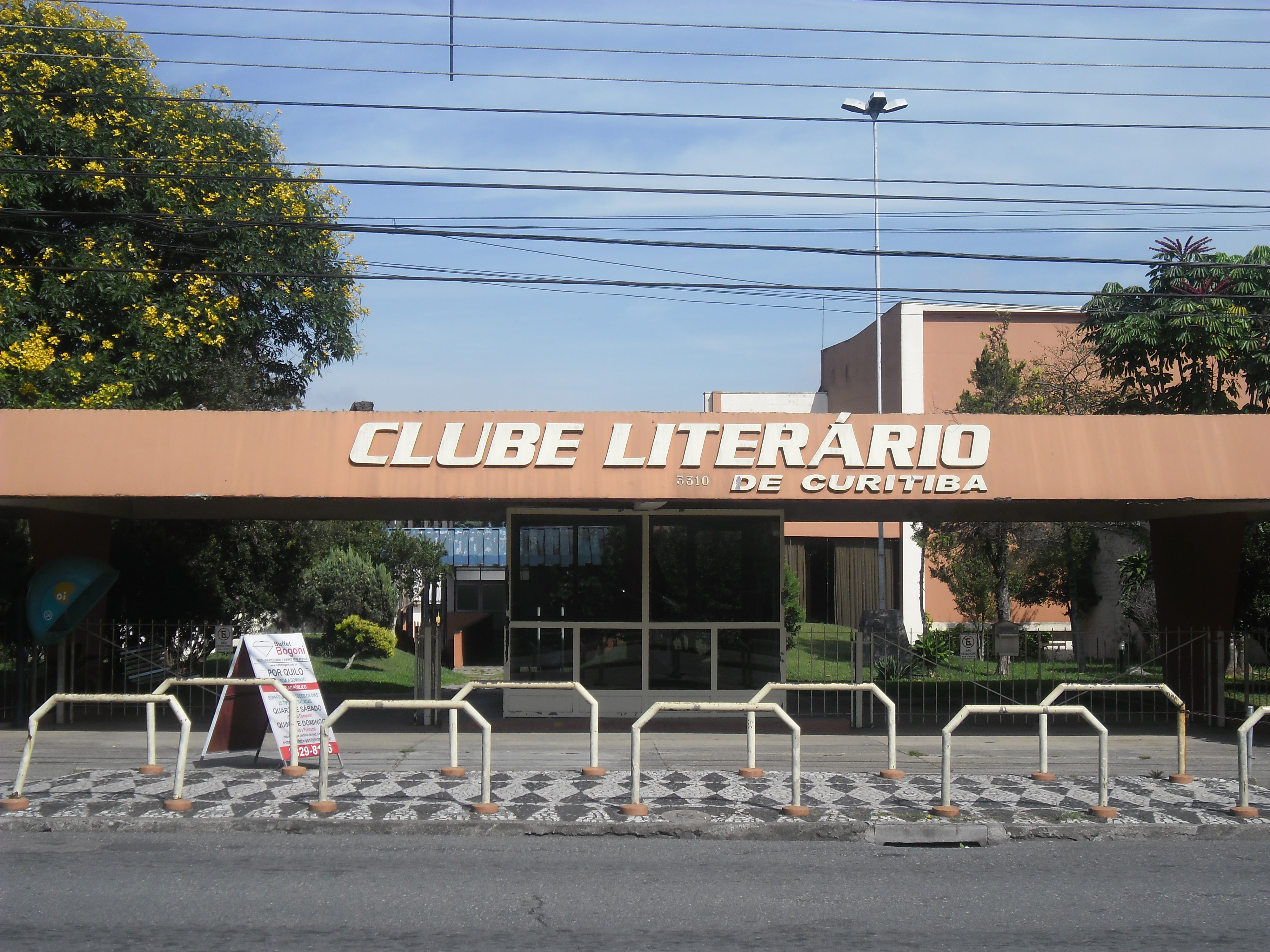 Clube Literário do Portão